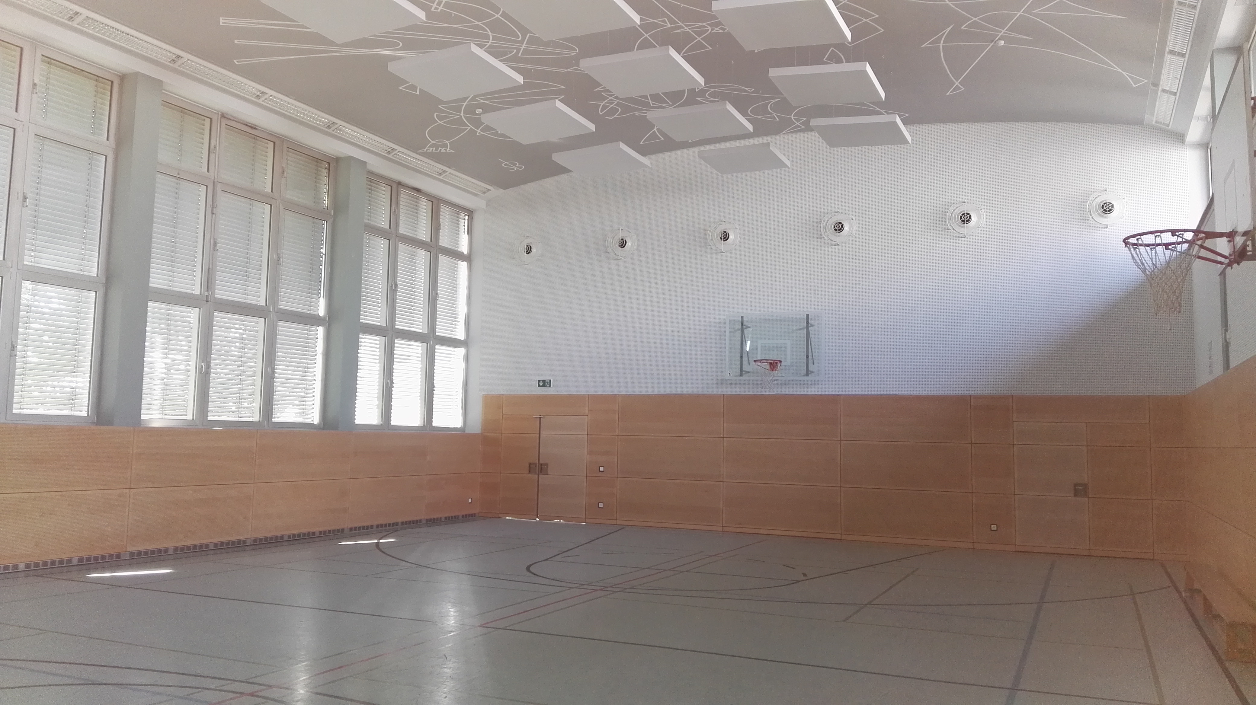 Kaufmännische Schule Tauberbischofsheim - Aula/Sporthalle